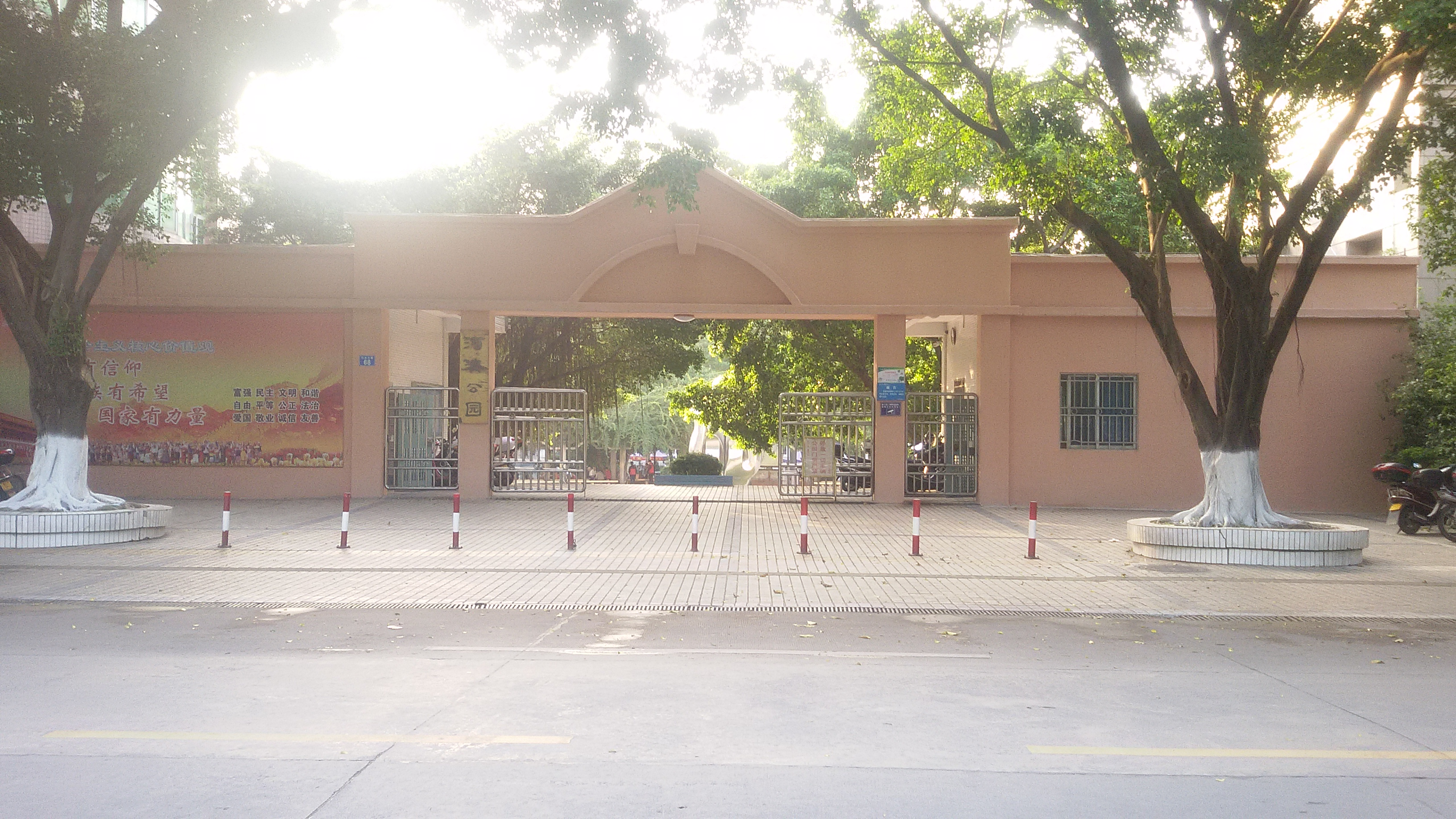 粵語: 從化河濱公園東門